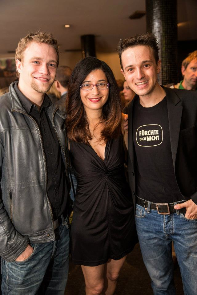 Schauspieler Michael Steinocher mit Darstellerin und Produzentin Laila Alina Reischer und Schauspielkollege Lucas Zolgar auf der Premiere von EISLAND